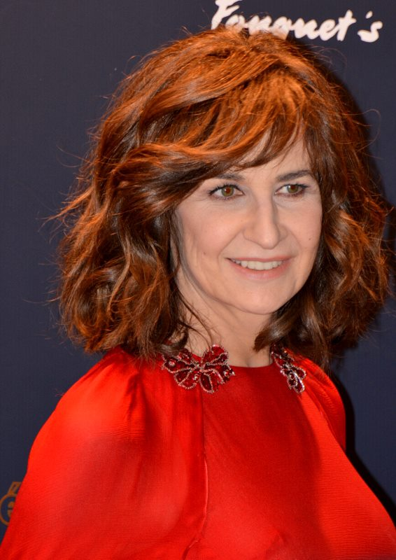 Valérie Lemercier à la cérémonie des César